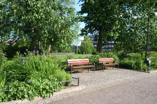 Penkki Katri Valan puistossa, Helsingissä.